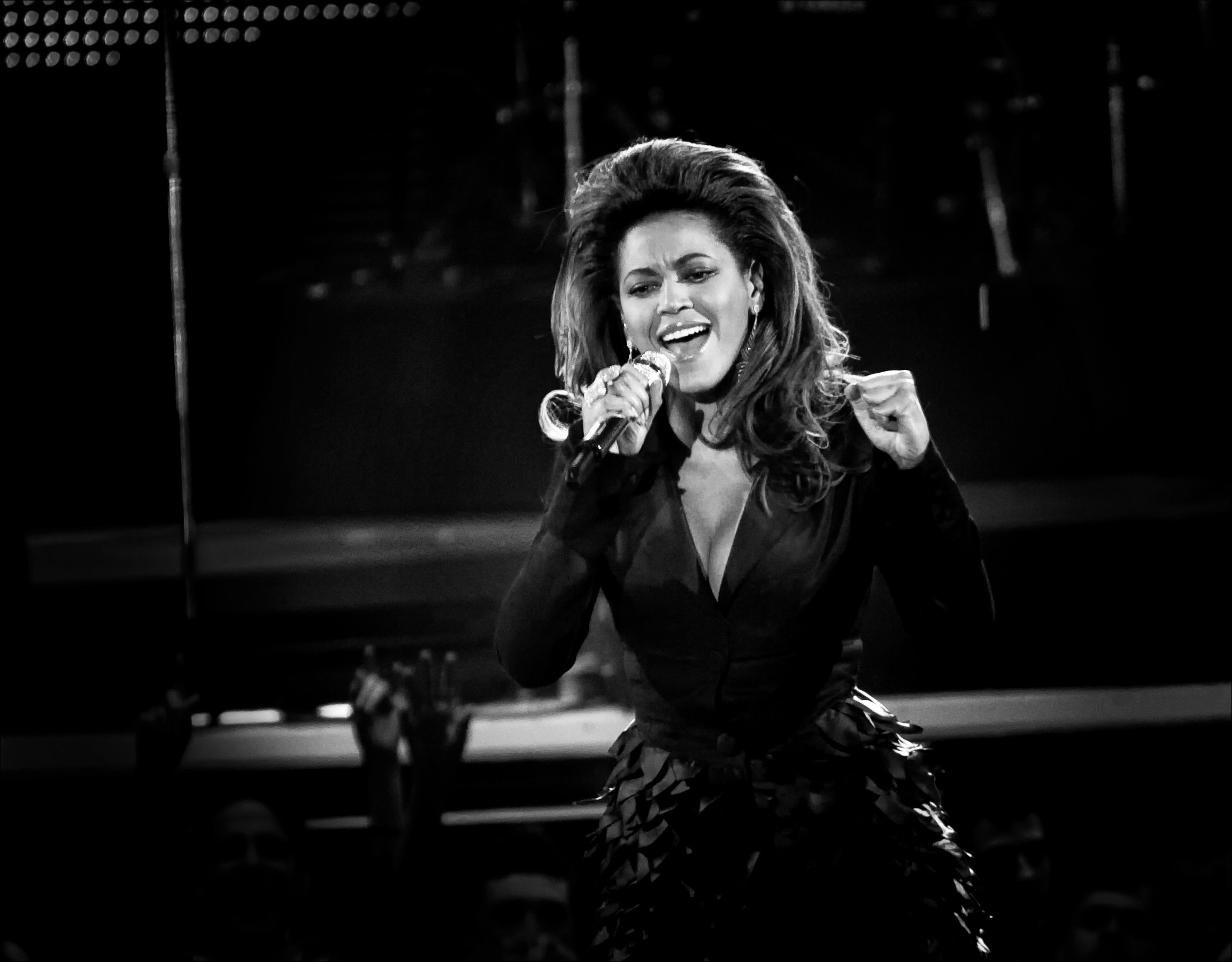 Beyoncé Premios 40 Principales Palacio de los Deportes 12.12.08 Madrid, Espana